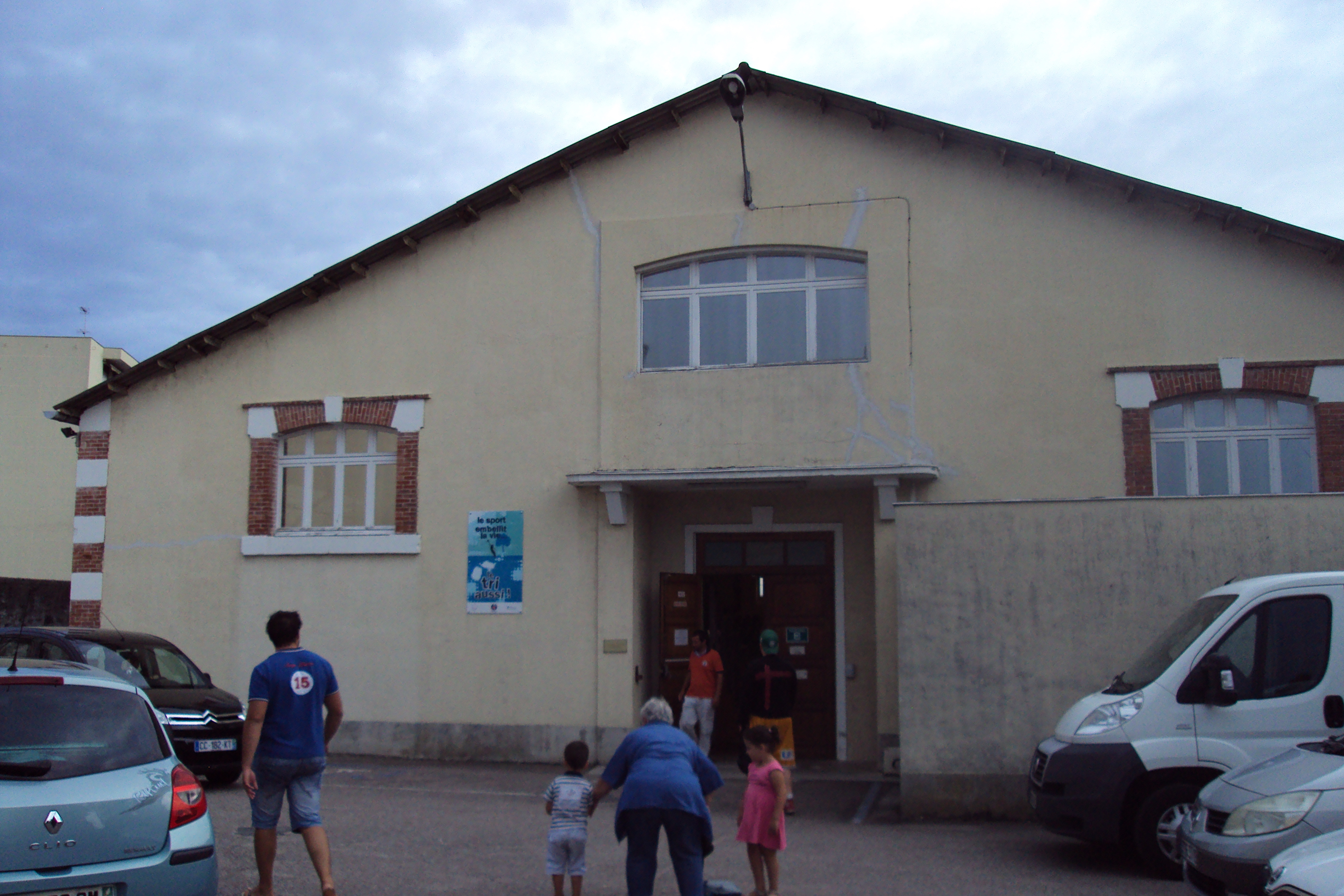 extérieur